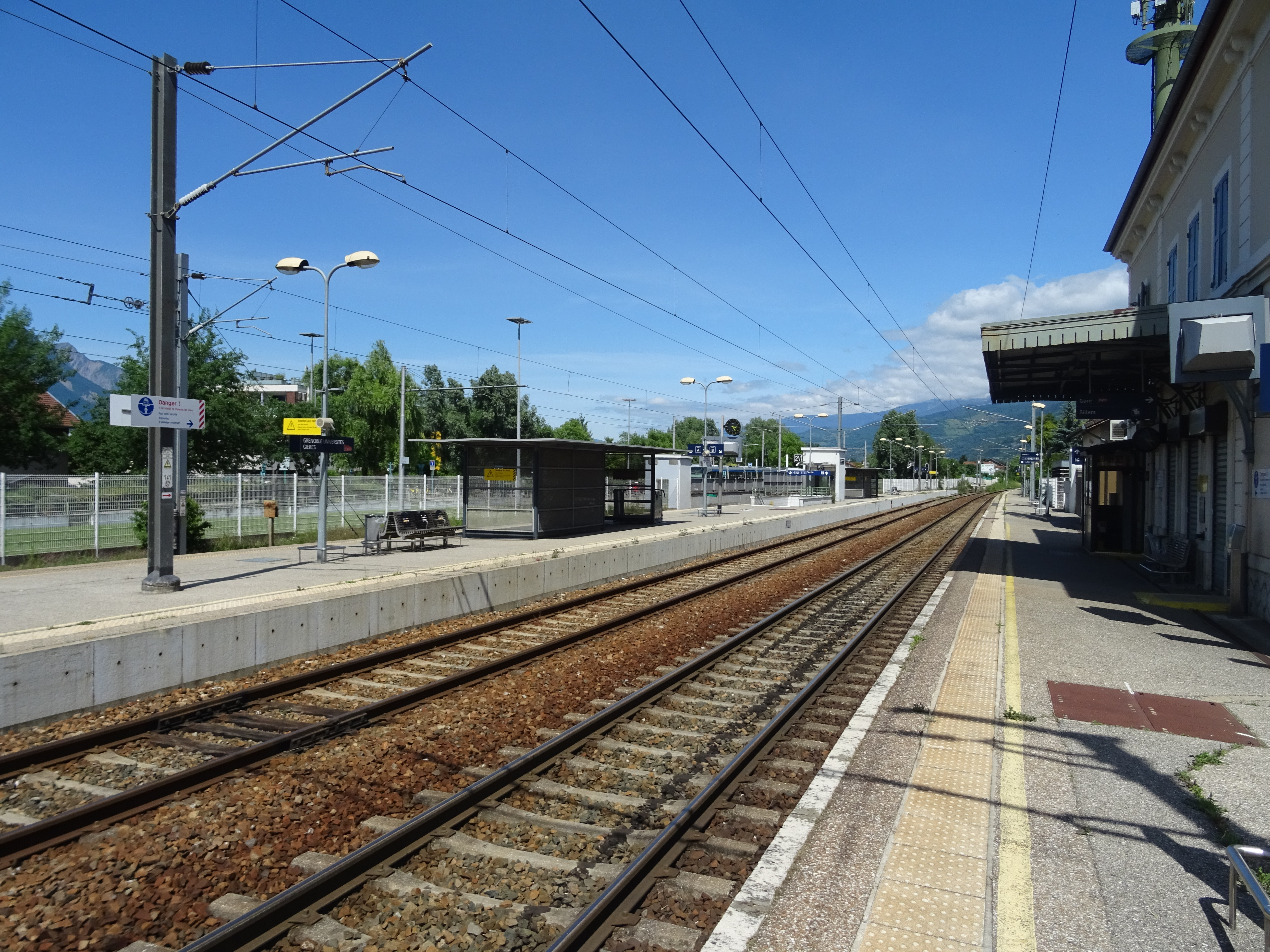 Voies B et C vues au niveau du bâtiment voyageurs.